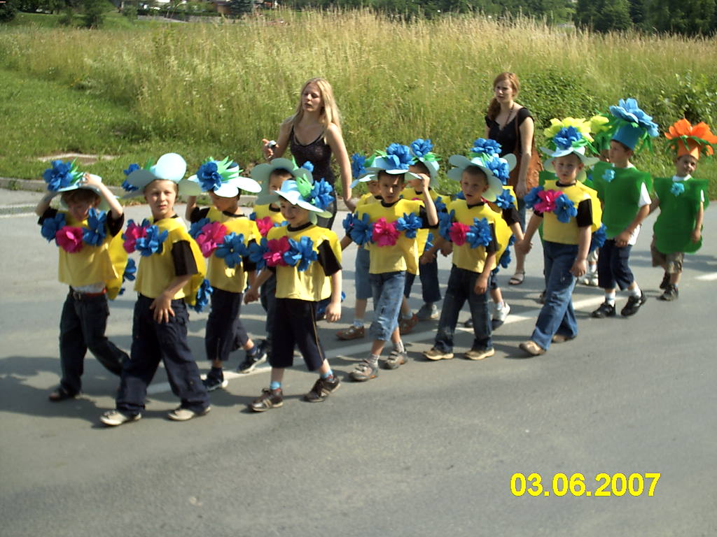 povorka djece iz vrtića obučenih u cvjetove